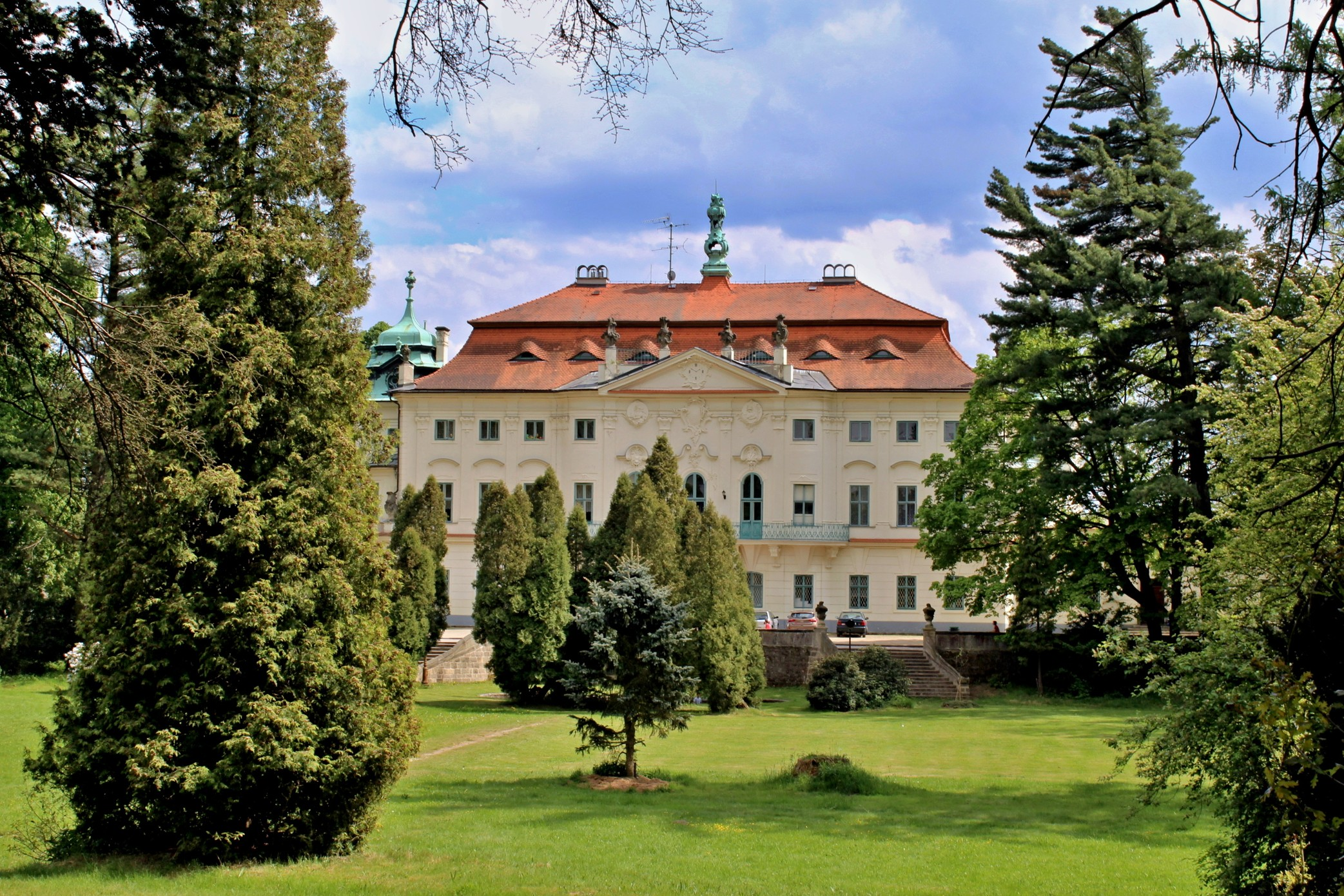 Zámek Nový Falkenburk v Jablonném